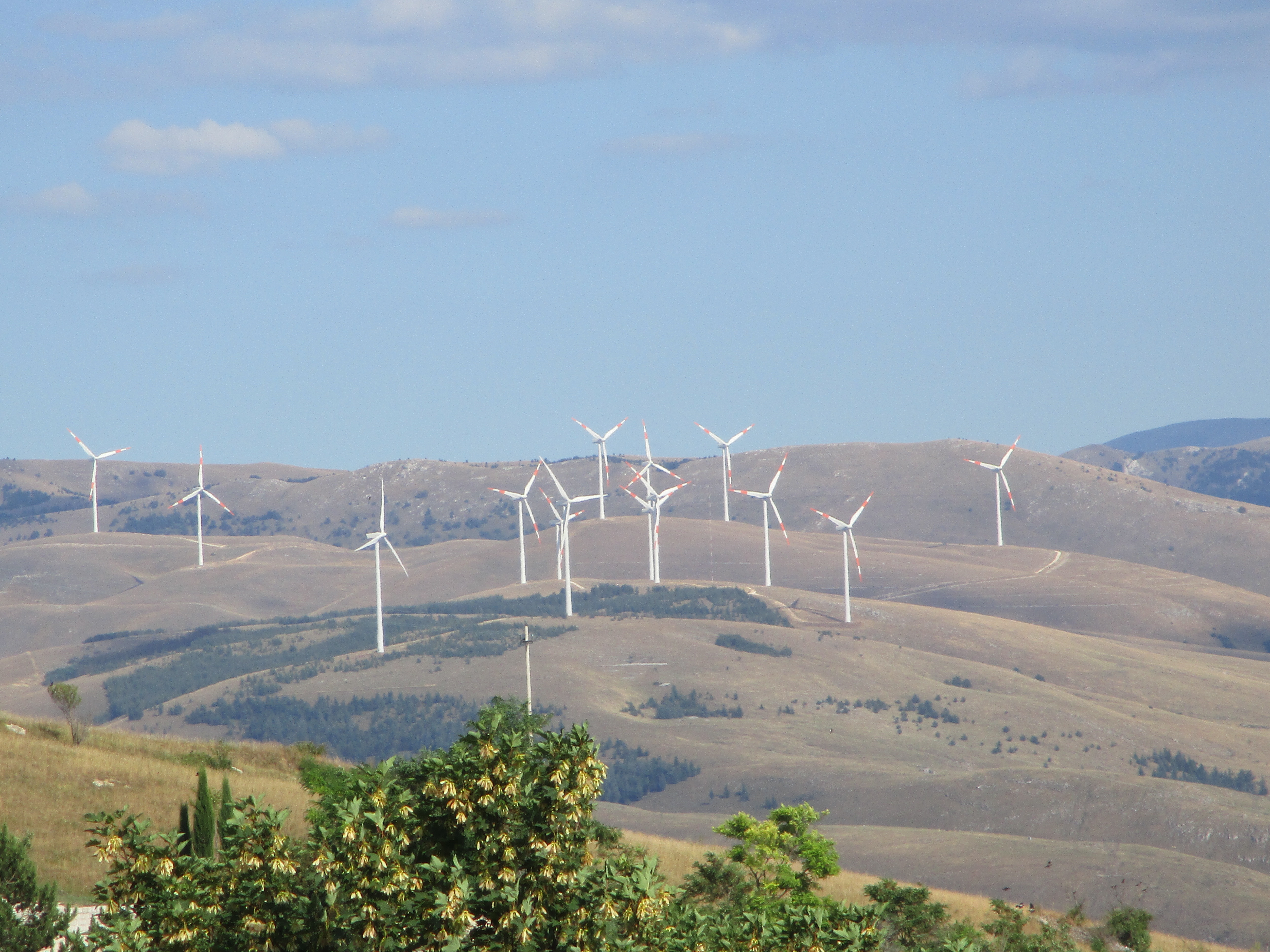 Pale eoliche di Collarmele